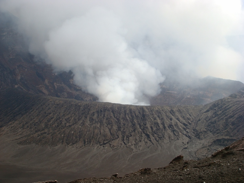 Le cratère secondaire sud du Benbow. (noter l'important dégazage)